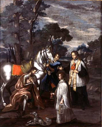 "Rudolf von Habsburg mit dem Priester", Sursee, 1735. Hinterglasgemälde, 56.8 x 46.5 cm Schweizerisches Nationalmuseum, Zürich, LM-24466